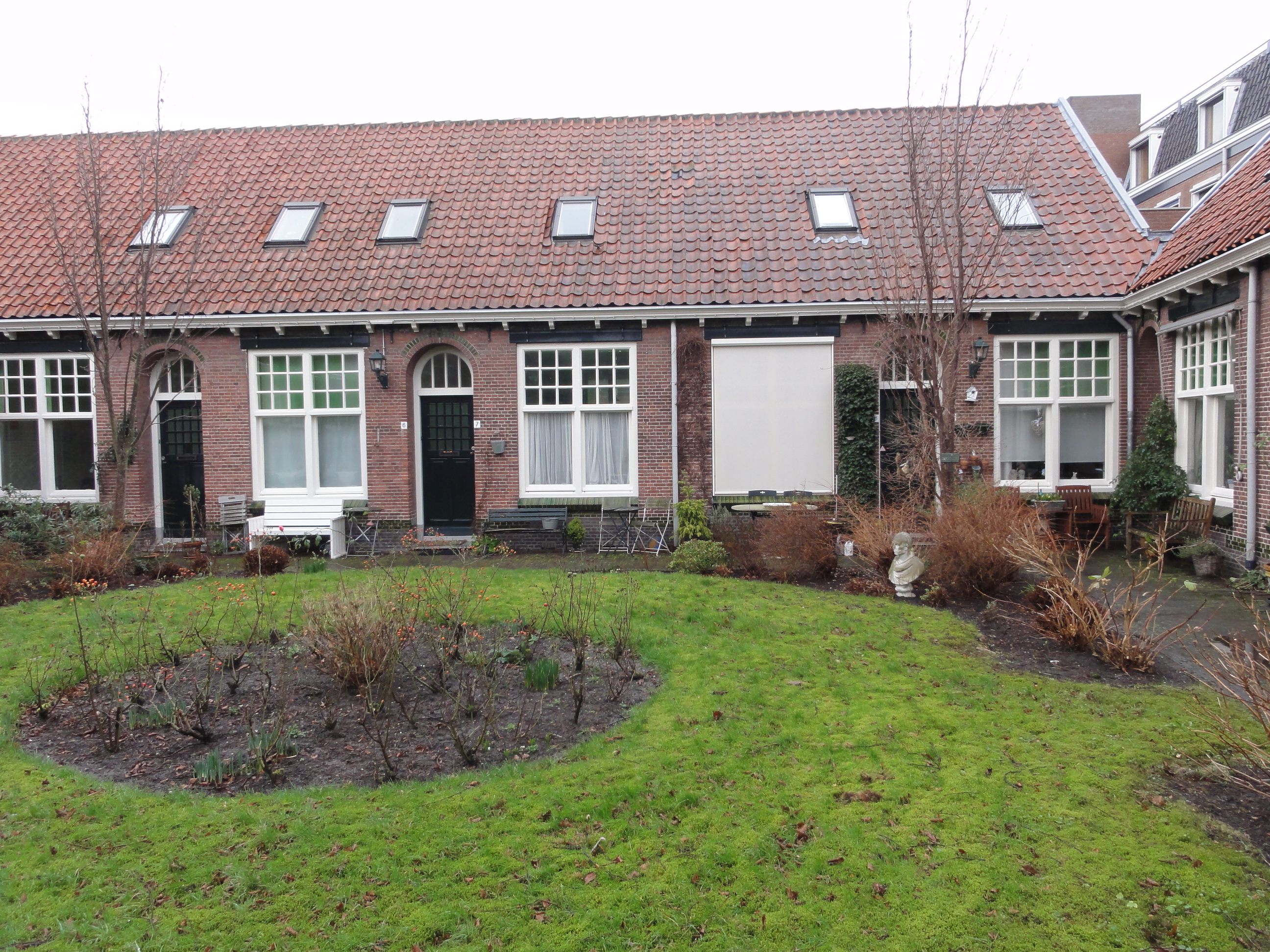 Bethaniën- of Emmaüshofje aan de Kaiserstraat 43 te Leiden.